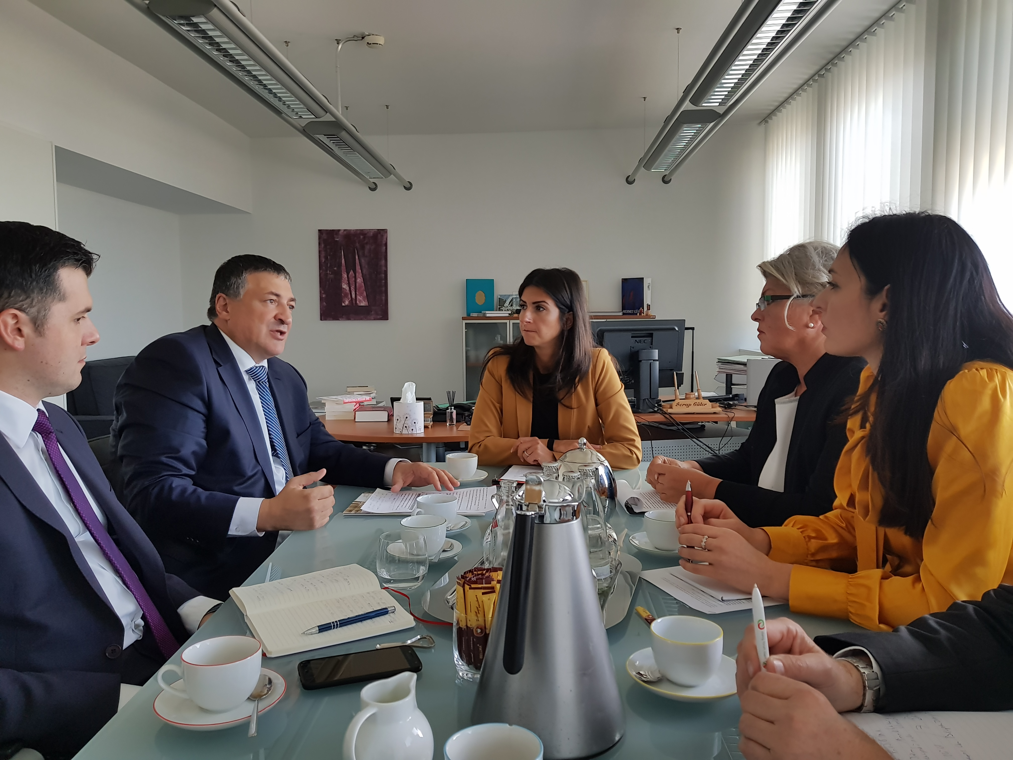 Ivica Tončev je 09. oktobra 2018. godine posetio vladu nemačke pokrajine Severne Rajne Vestfalije u kojoj se susreo sa Serap Guler, državnom sekretarkom za pitanja integracija u Ministarstvu za decu, porodicu, izbeglice i integraciju.